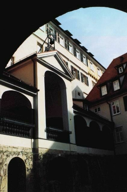 Tübinger Stift. - Foto: Jakob Vetsch, 04.04.1995.